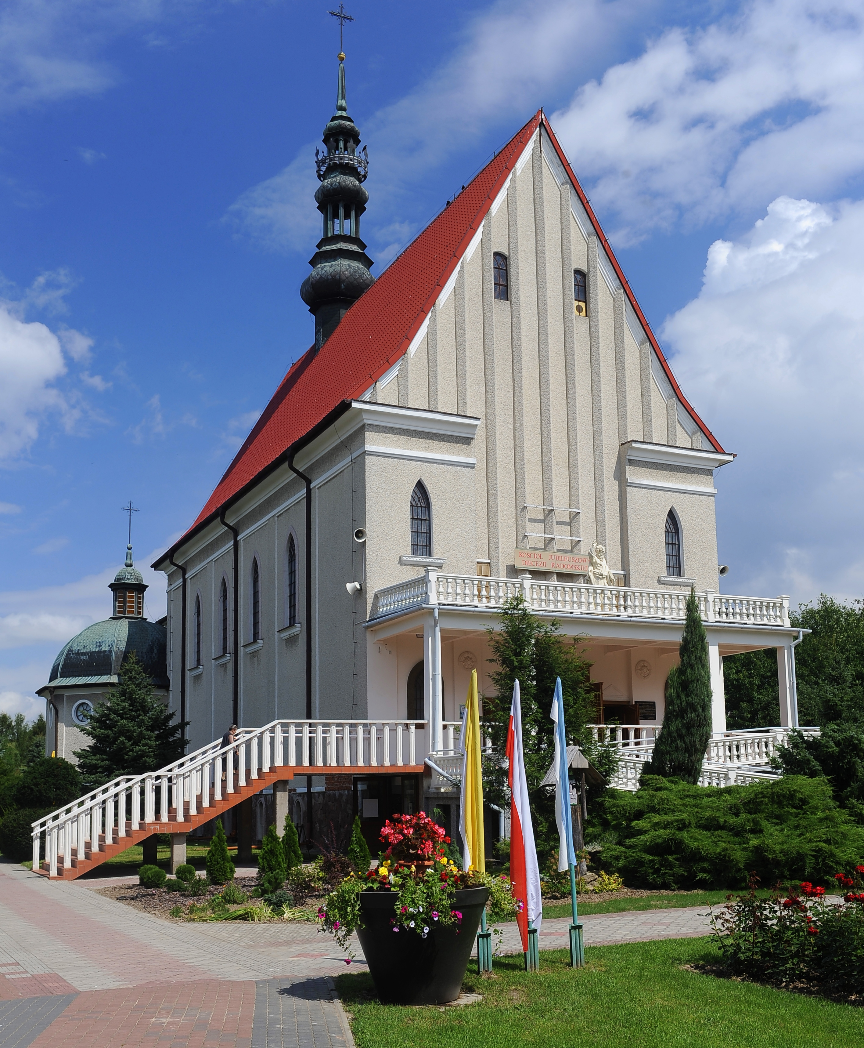 Sanktuarium pod wezwaniem Bolesnej Królowej Polski w Kałkowie